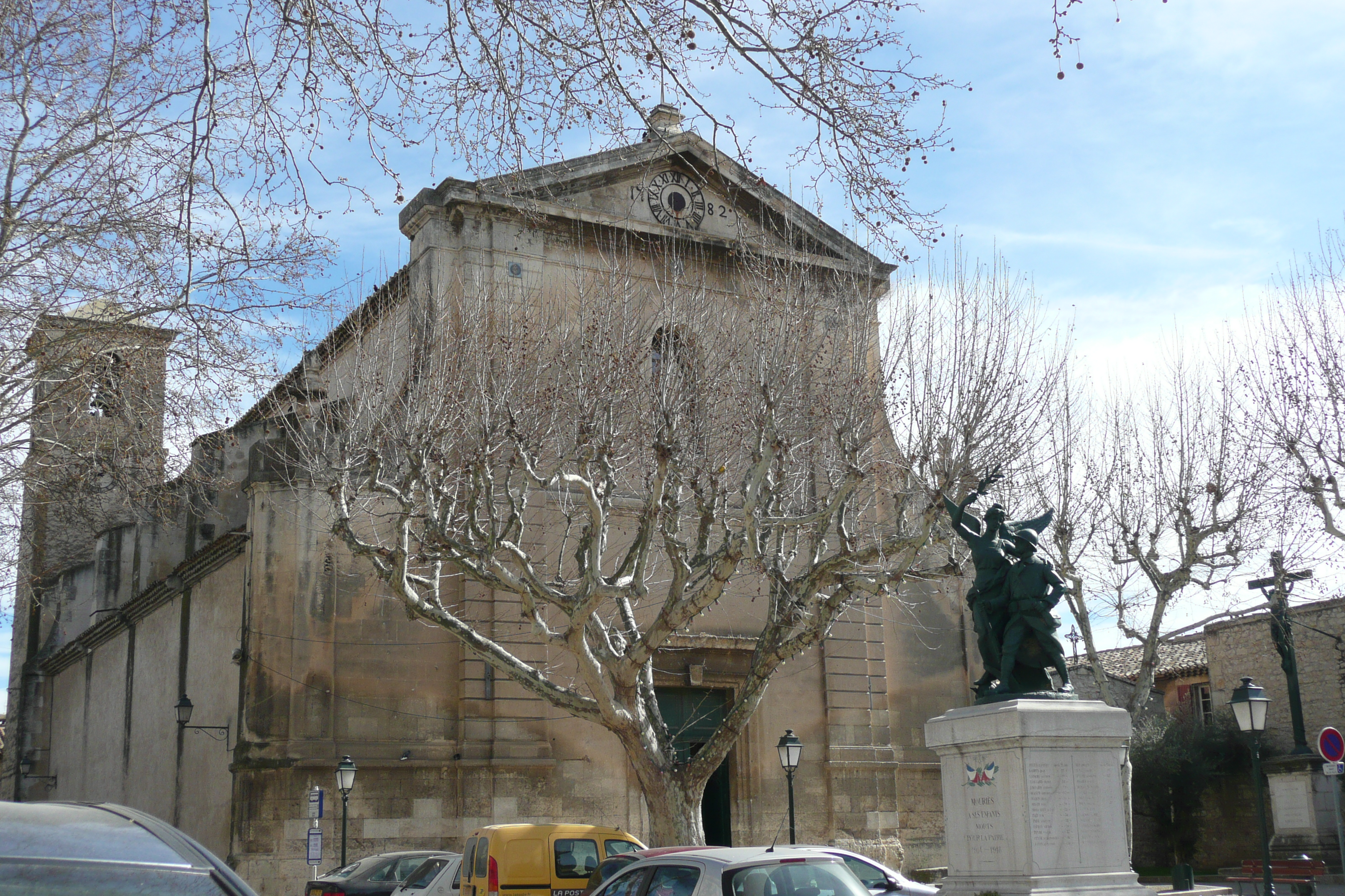 Église de Mouriès (Bouches-du-Rhône, France)